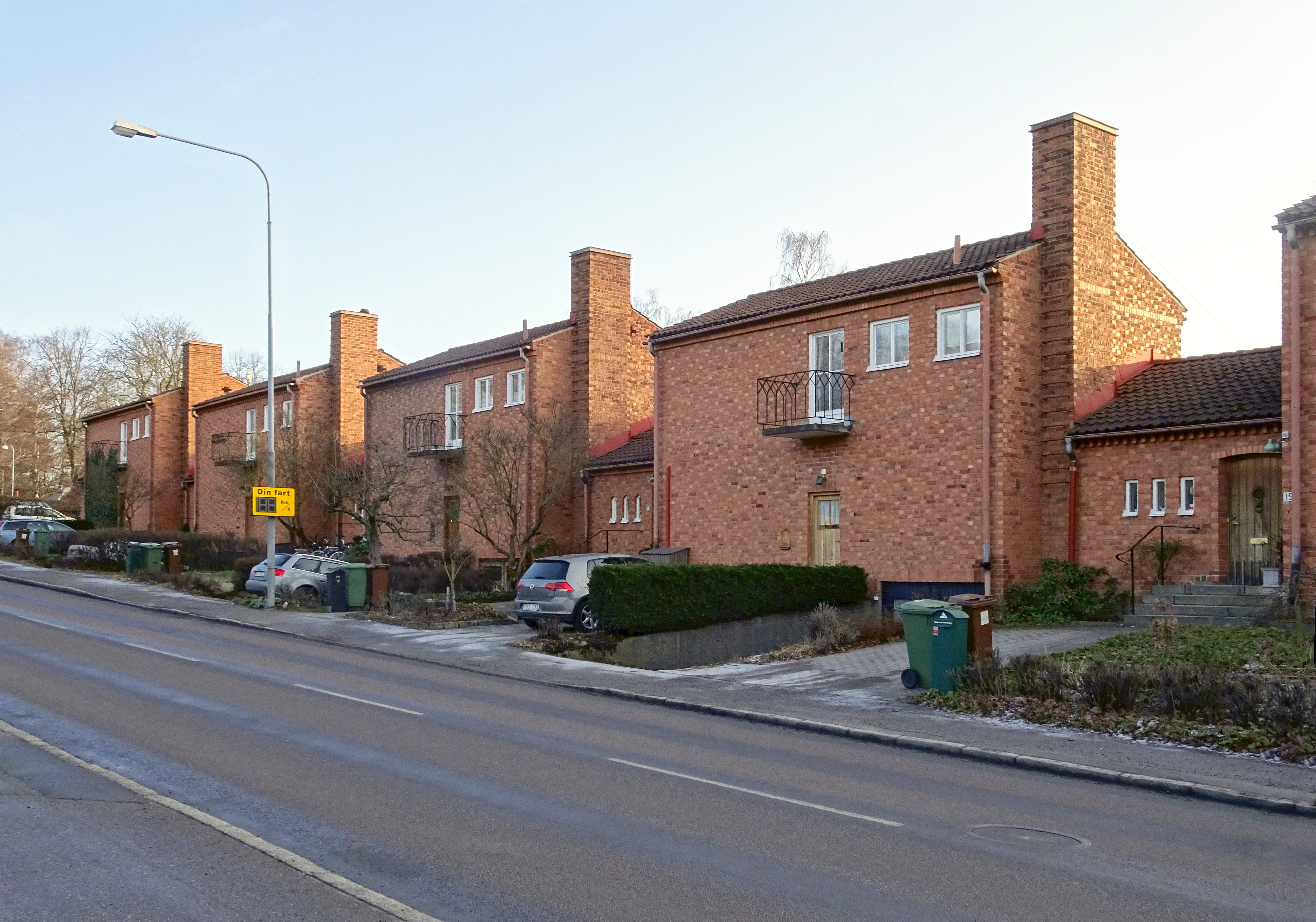 Radhus i kvarteret Klockaren, Solna, 1940-tal, arkitekt Dag Ribbing